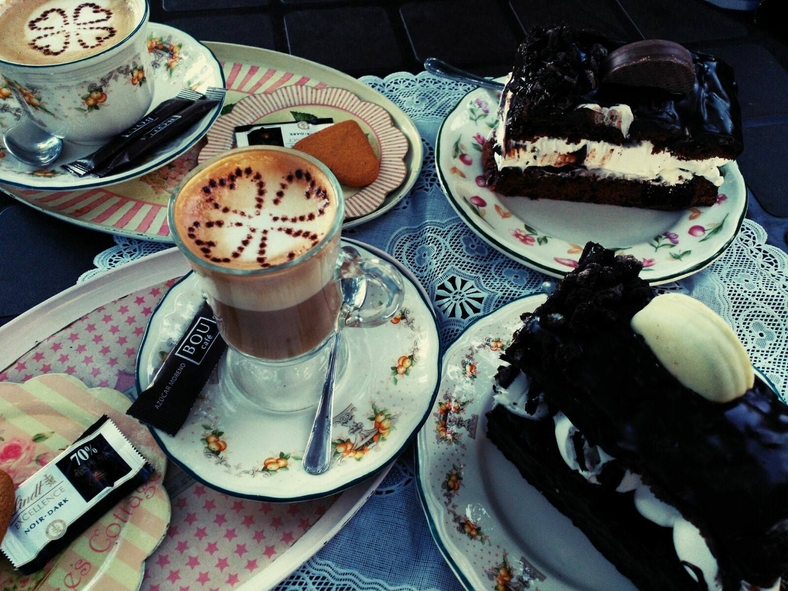 Fotografía de un rico postre de chocolate en Cantabria.